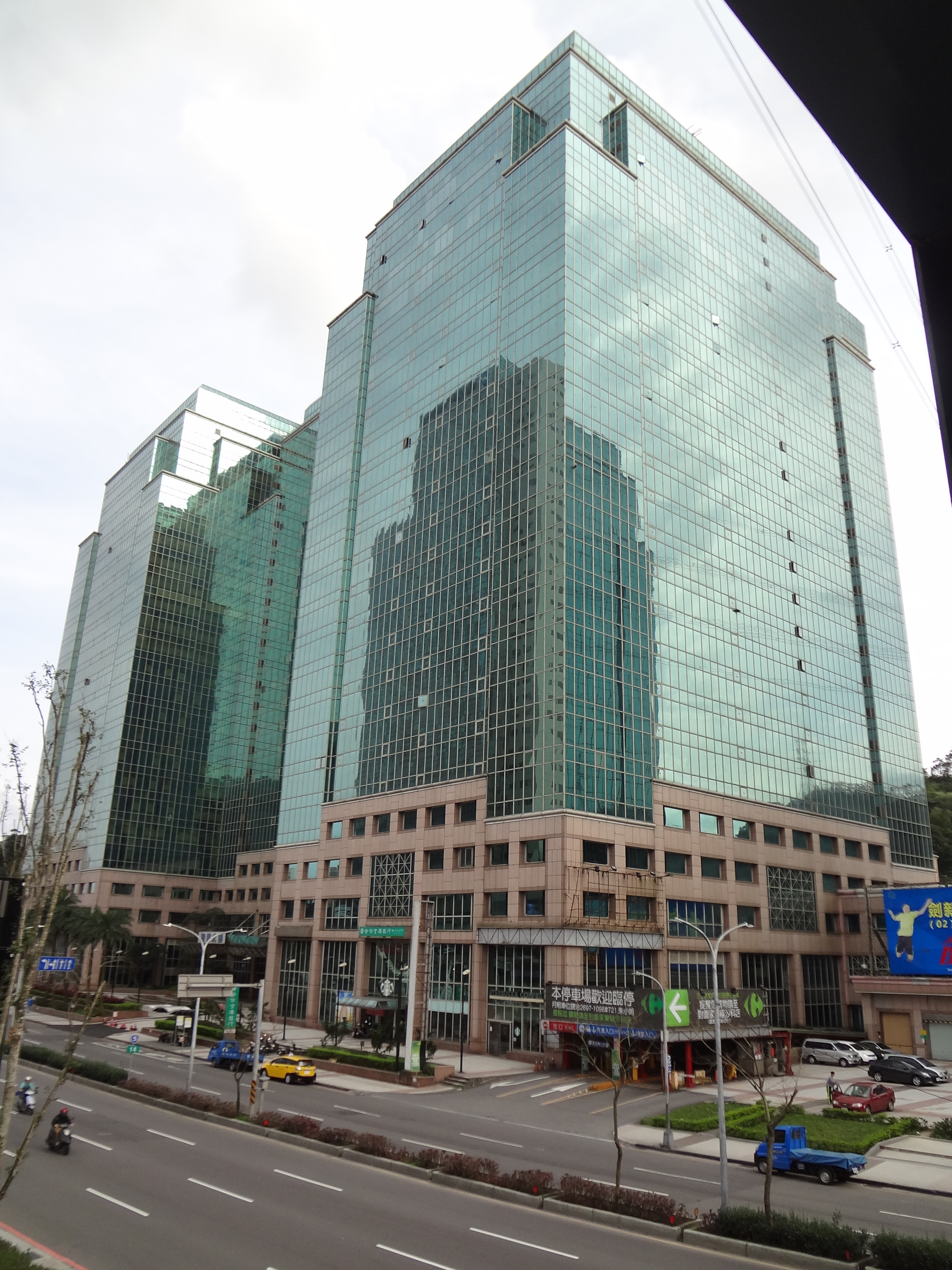 東方科學園區，位於臺灣新北市汐止區新台五路一段90至116號。